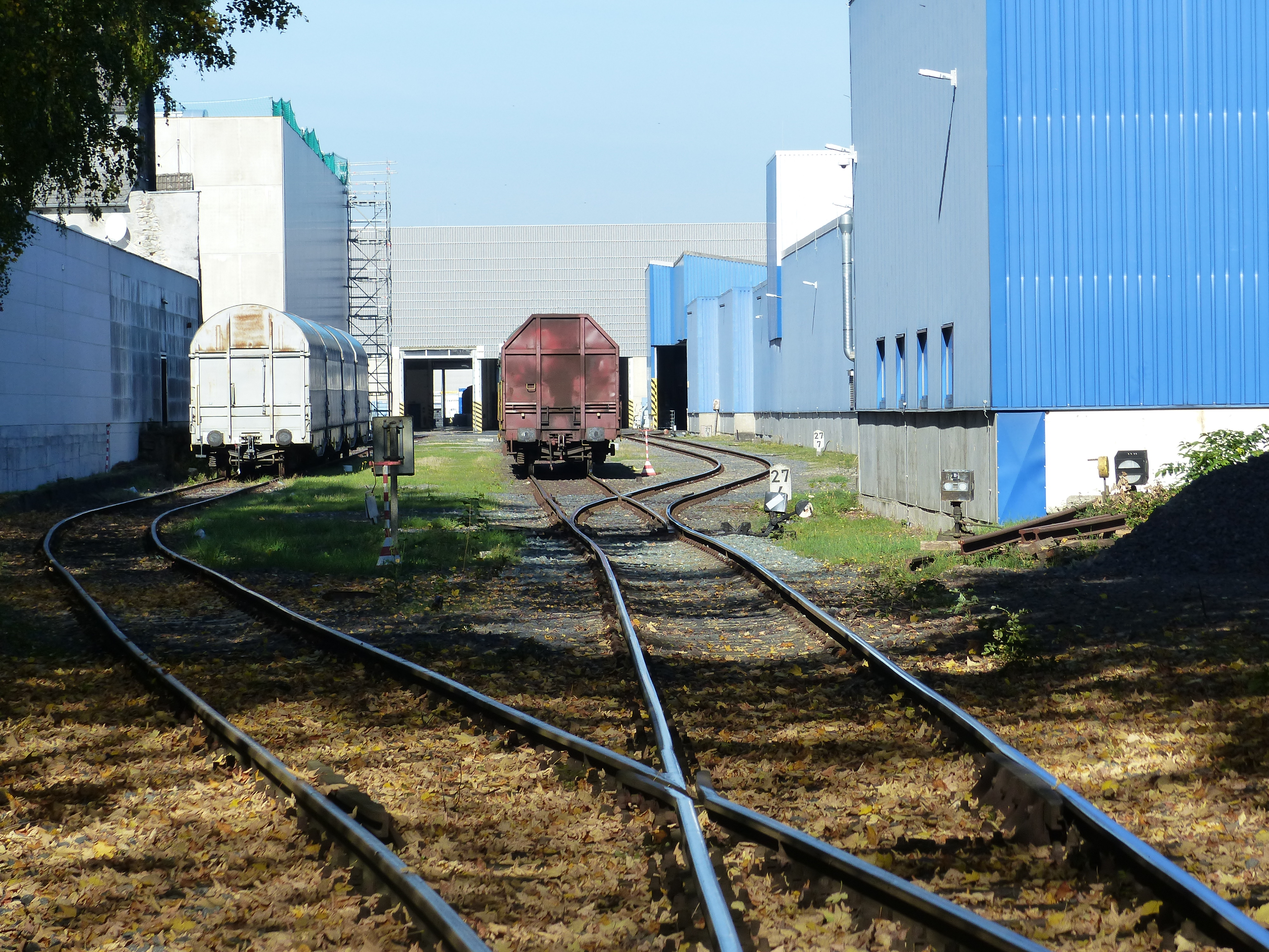 Holzbachtalbahn: Passage des Betriebsgeländes der Firma Schütz. Selters